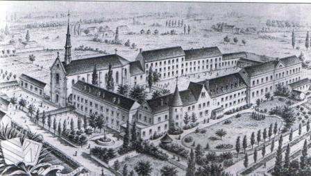 Voormalig Sint-Amandscollege Kortrijk